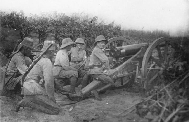 Deutsch-Ostafrika, Deutsches Feldgeschütz Vom Krieg in Deutsch-Ostafrika. Deutsches Feldgeschütz in Stellung.